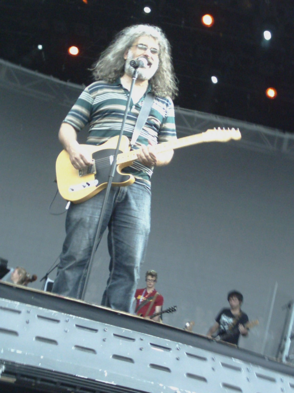 Michel Pagliaro aux FrancoFolies de Montréal